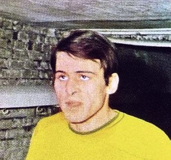 Philippe Gondet en 1970, 'Ageducatifs 1970 - 1971', Panini figurina n°142.